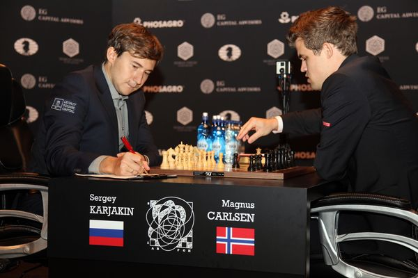 Карлсен - Карякин, 6 партия